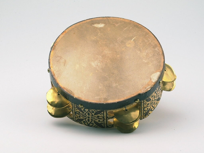 Deze lijsttrom (tamboerijn) bestaat uit een houten lijst waarover een stuk leer bevestigd is. In deze lijst zijn 10 rechthoekige gaten gemaakt, waarin elk een paar rinkelschijven zitten. De lijst is met florale motieven beschilderd.